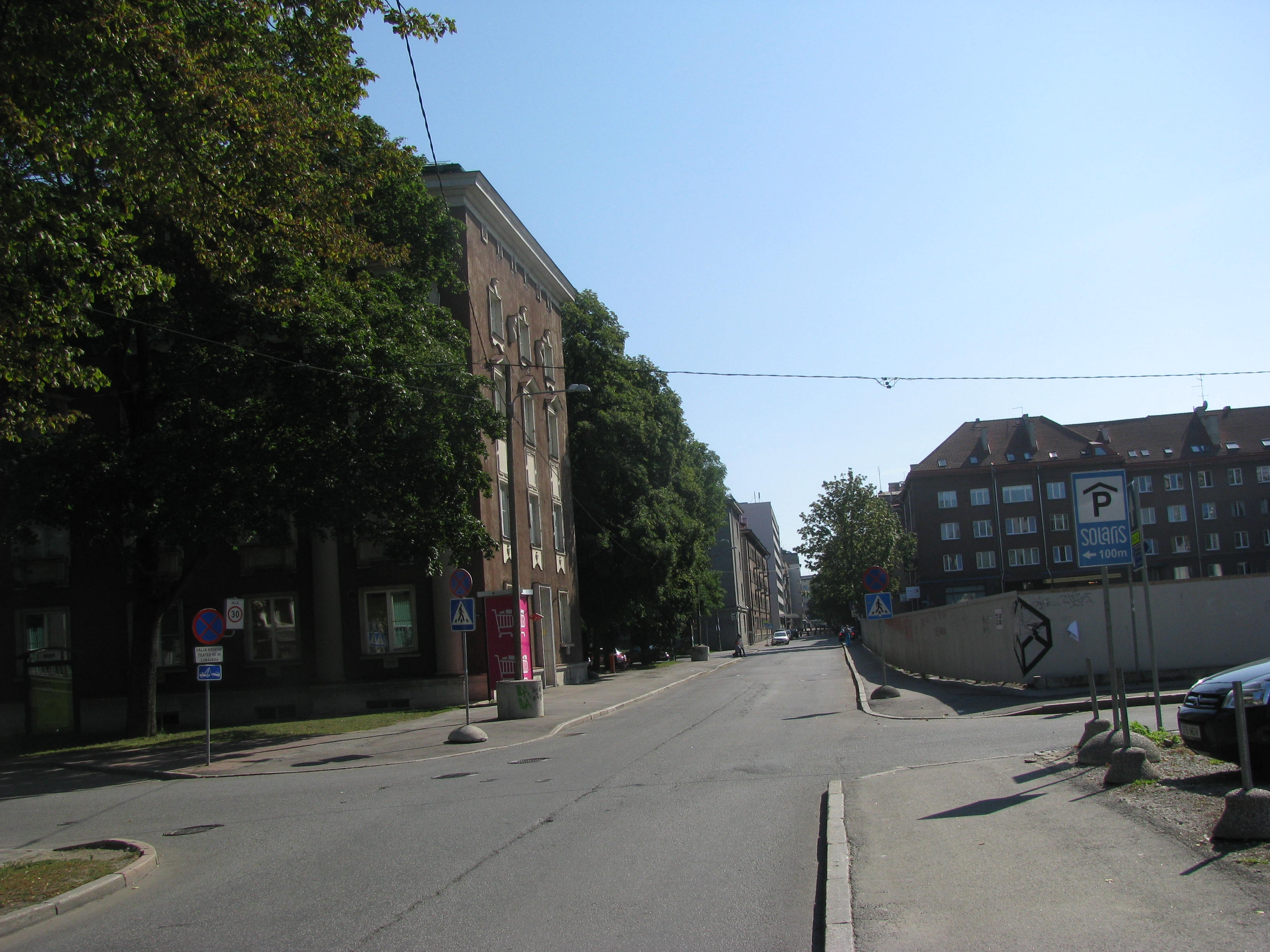 Sakala ja Kentmanni tänava ristmik Tallinnas, vaade Estonia puiestee poolt.